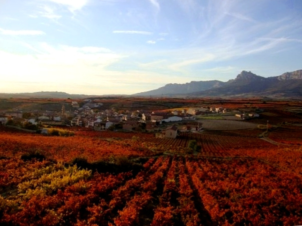 Lanciego